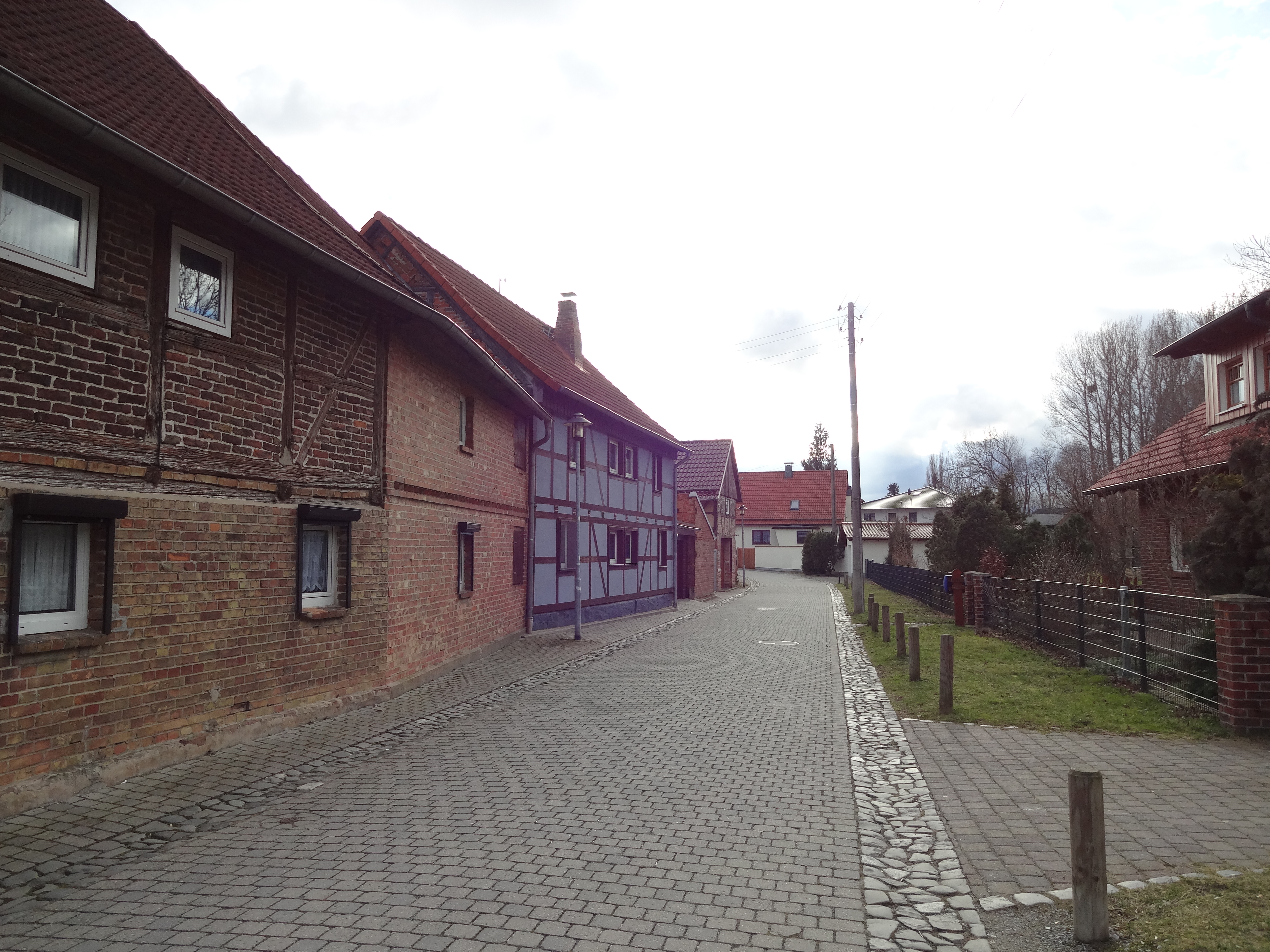 Mühlenstraße 13 und 14 in Silstedt, Ortsteil von Wernigerode